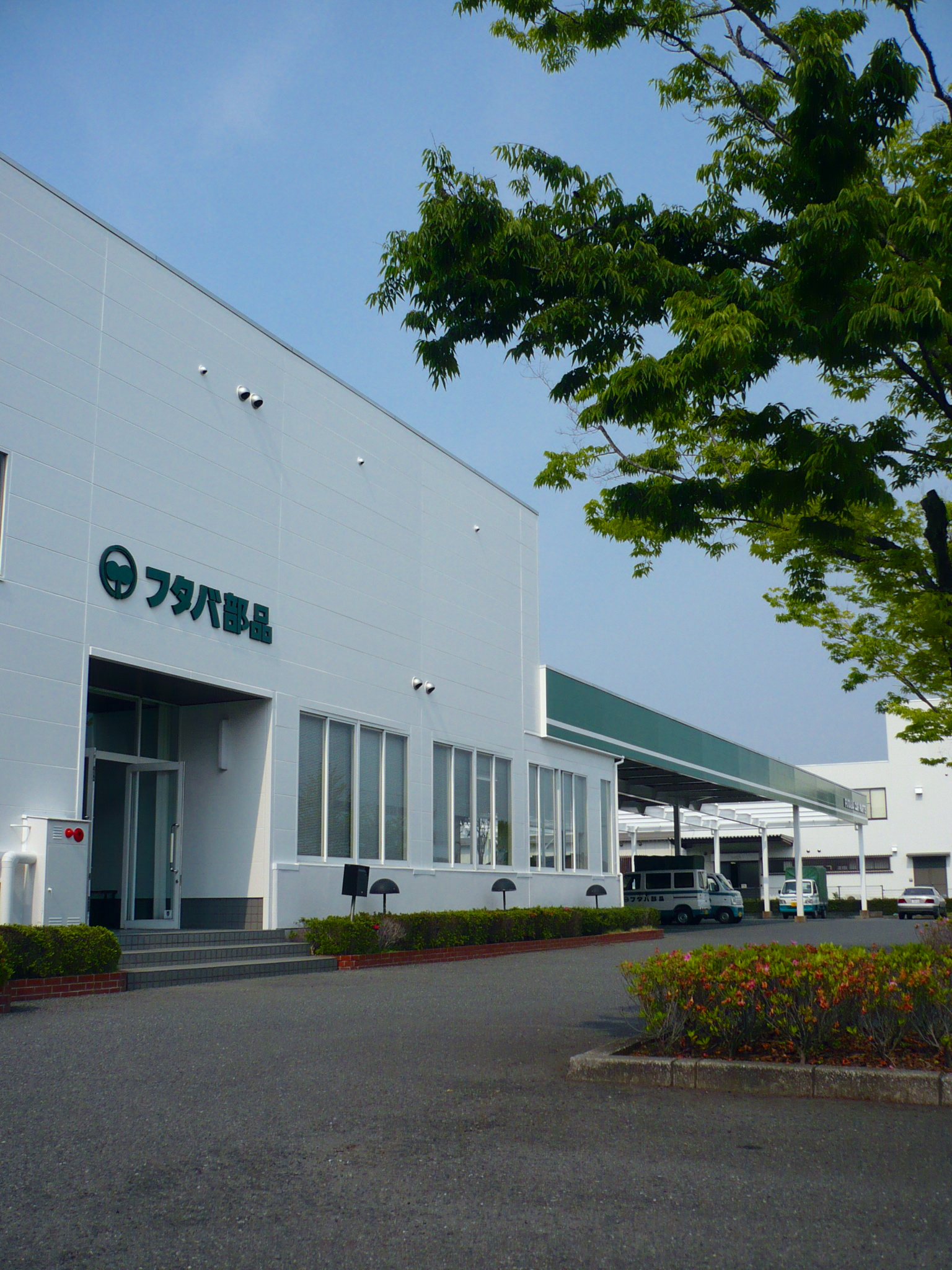 フタバ 本社